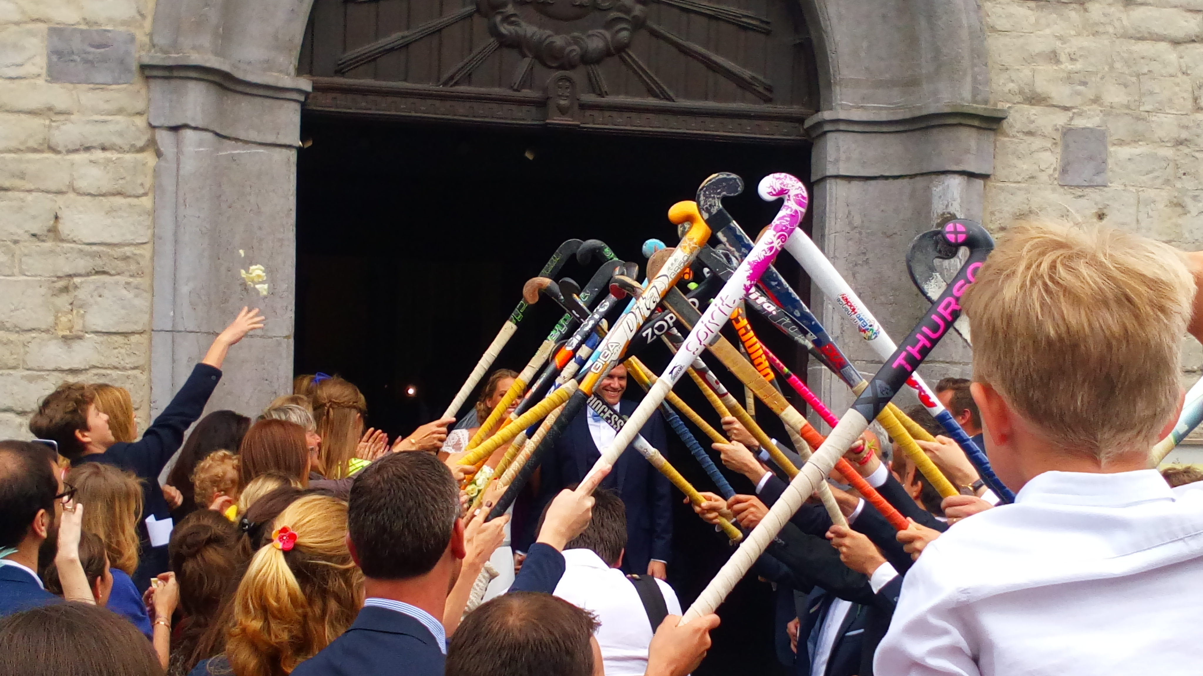 Haie d'honneur faite de joueurs et leurs sticks de hockey à la sortie d'une messe de mariage catholique à l'Eglse Saint Etienne de Braine l'Alleud (Belgique)